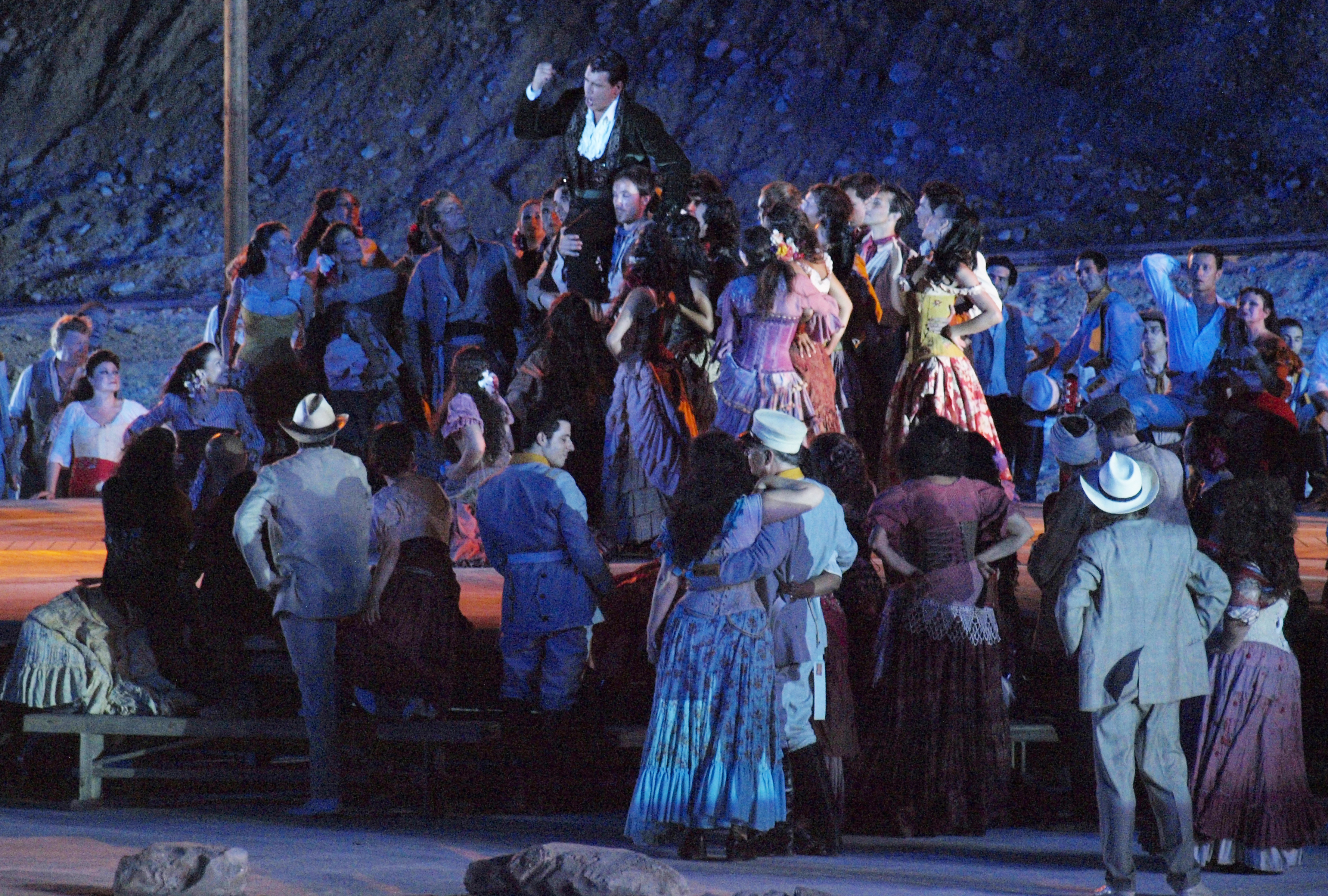 Carmen on Masada